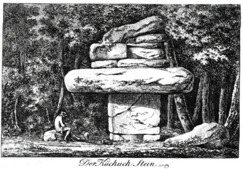 Der Kuckuckstein im Königshainer Gebirge 1780 von Carl Adolph Gottlob von Schachmann